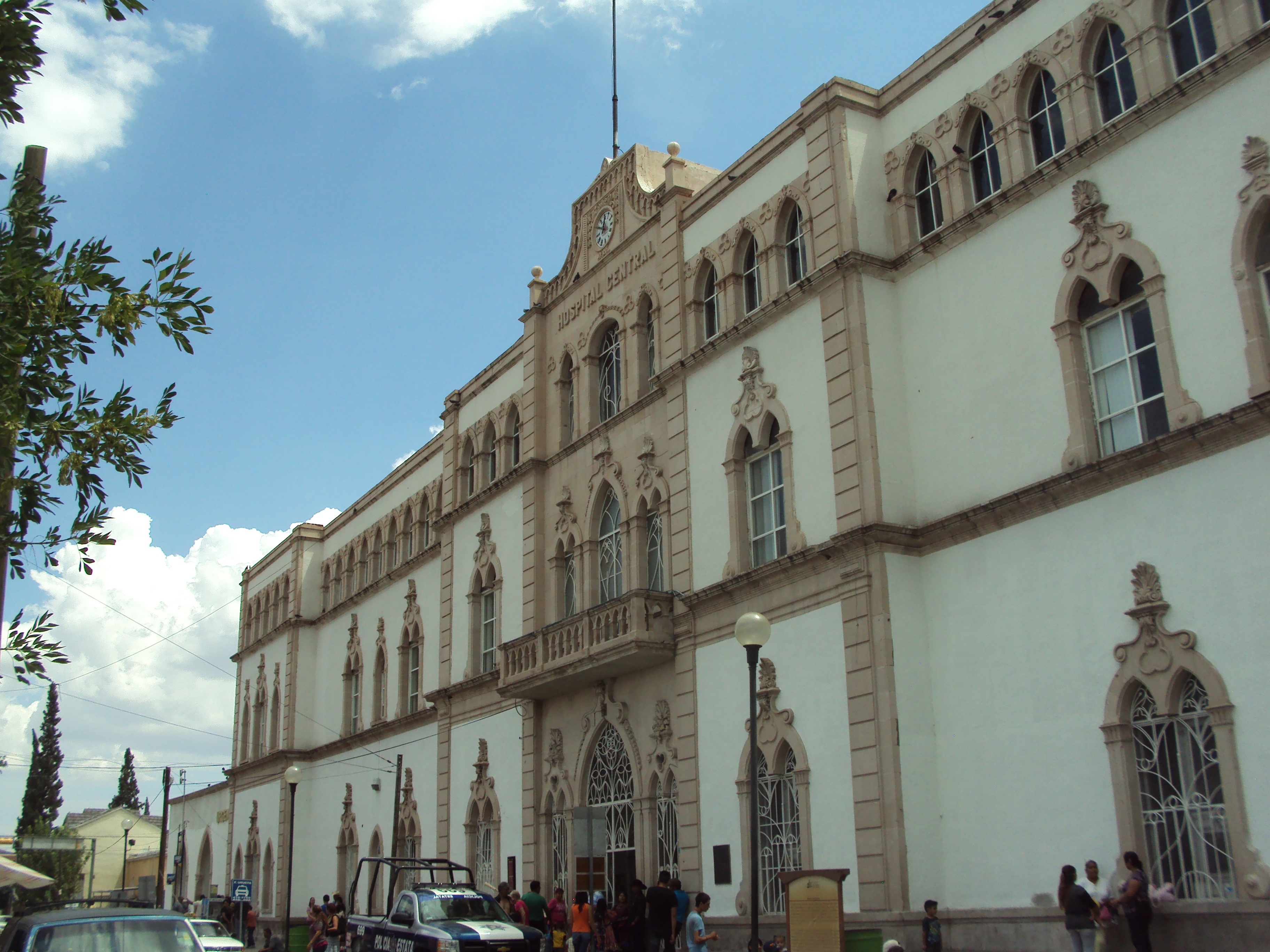 Fachada del Hospital Central Universitario, antiguo Hospital Porfirio Díaz, en Chihuahua, Chihuahua.